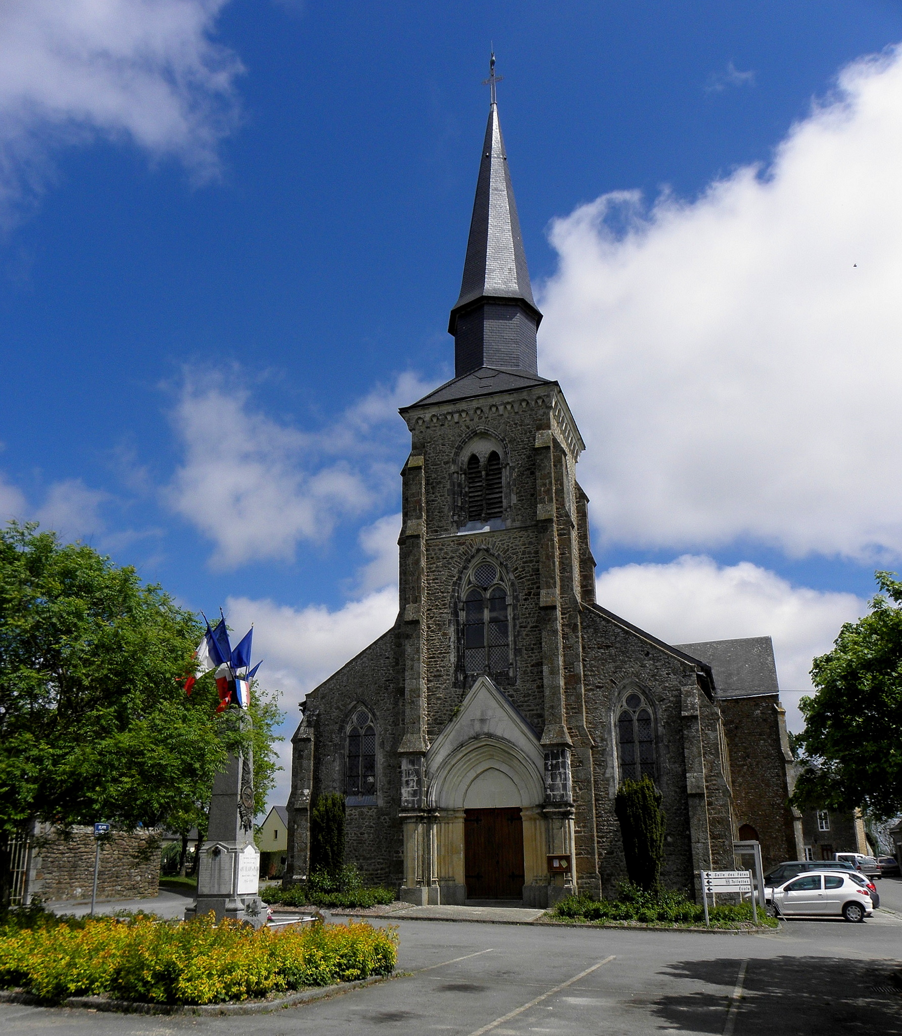 Église Saint-Hilaire de Saint-Hilaire-du-Maine (53). Façade occidentale.